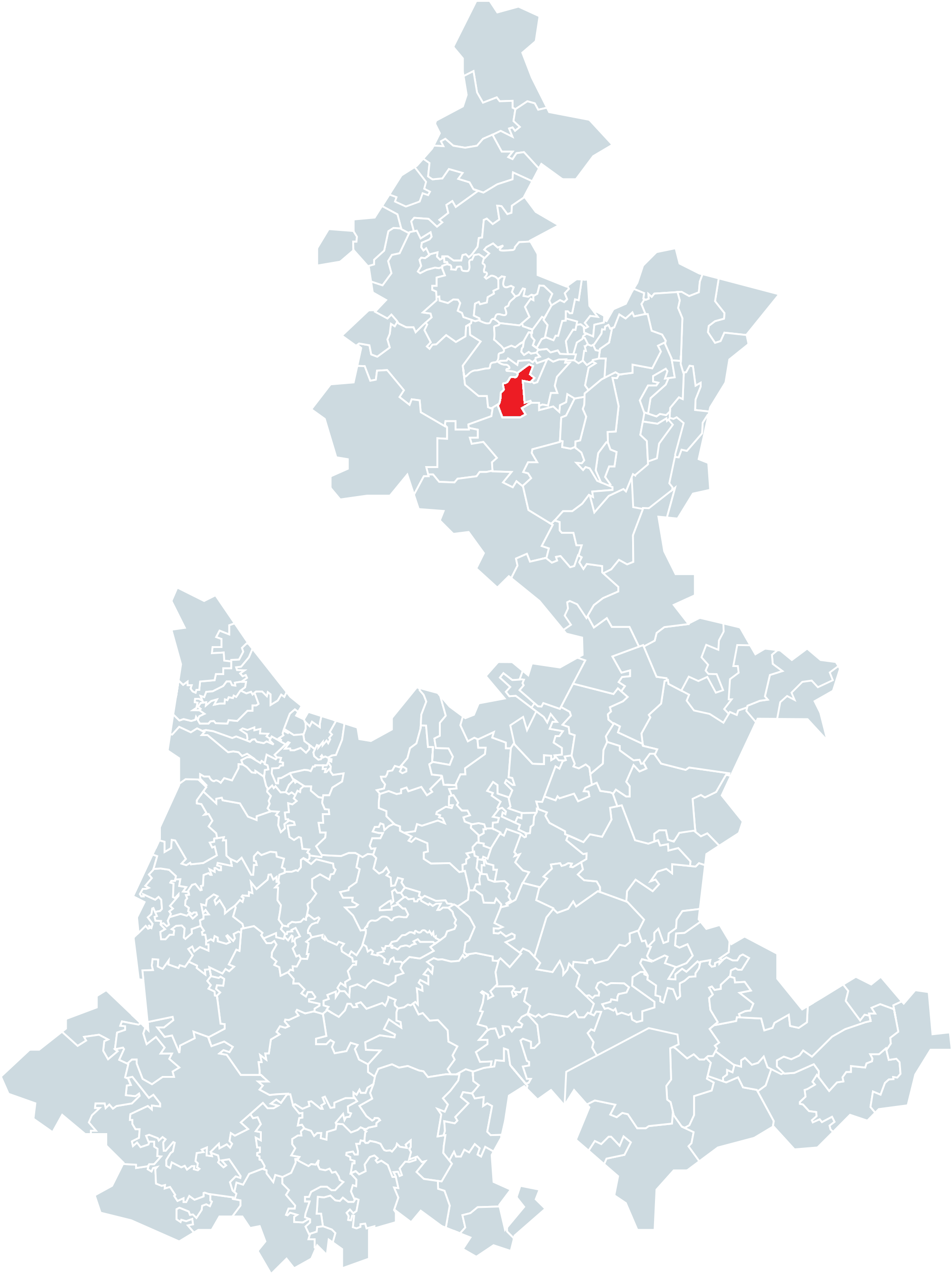 Municipio de Cuautempan